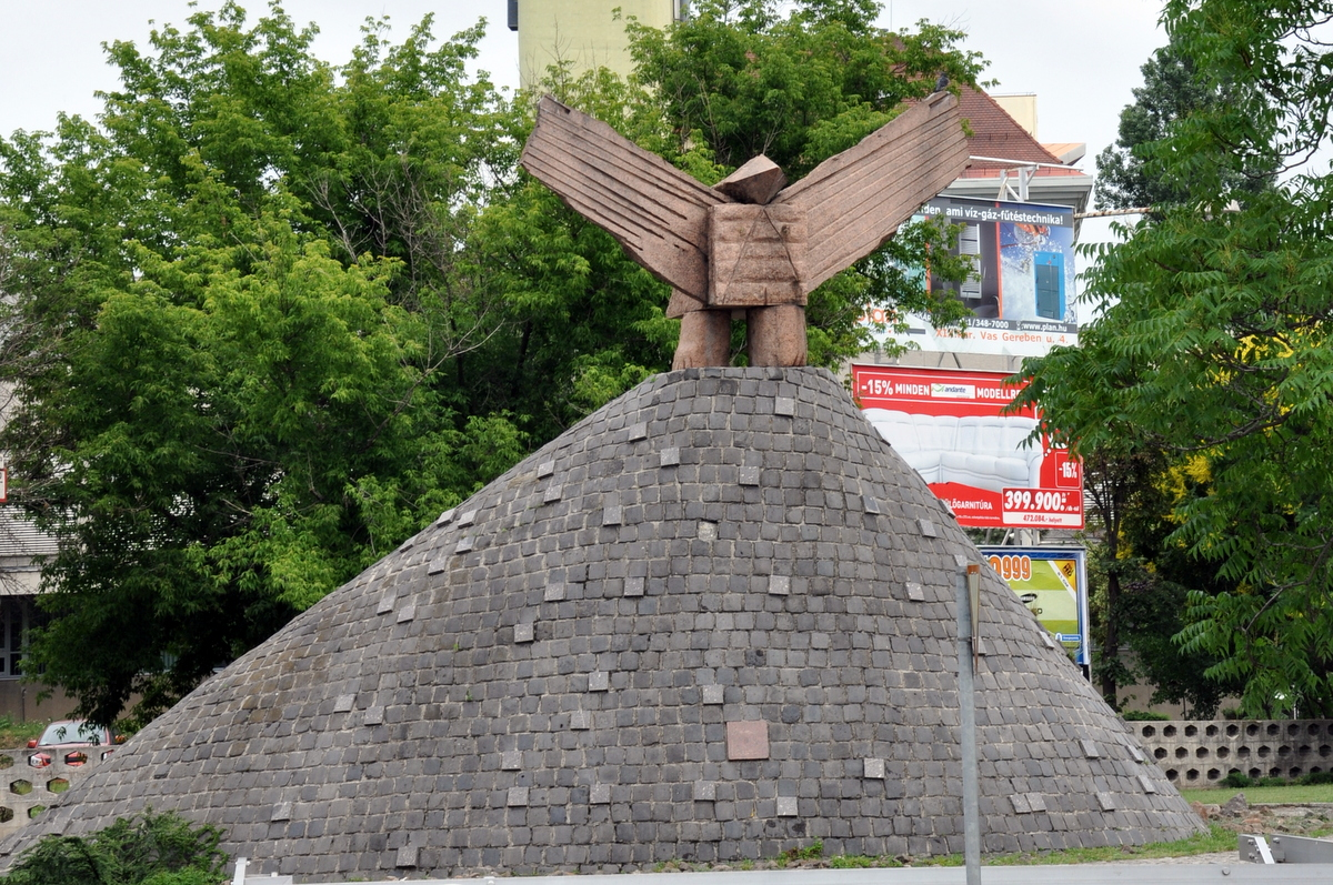 Pierre Székely "Béke" (1983) című alkotása a Nagyvárad téren, Budapesten Unknown